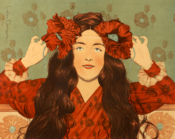 Jeune fille aux Coqelicots pour L´estampe moderne Lithography on Vélin 26,6 cm x 33,4 cm.